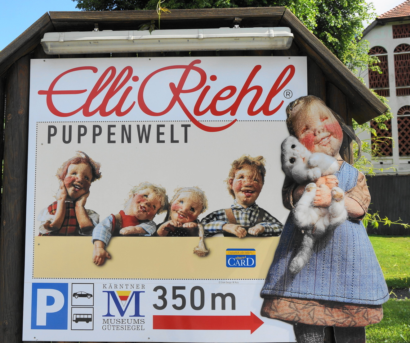 Elli Riehl Puppenwelt Logo, Winklern, Gemeinde Treffen am Ossiachersee, Buchholzerstraße 4, Bezirk Villach Land, Kärnten, Österreich, EU